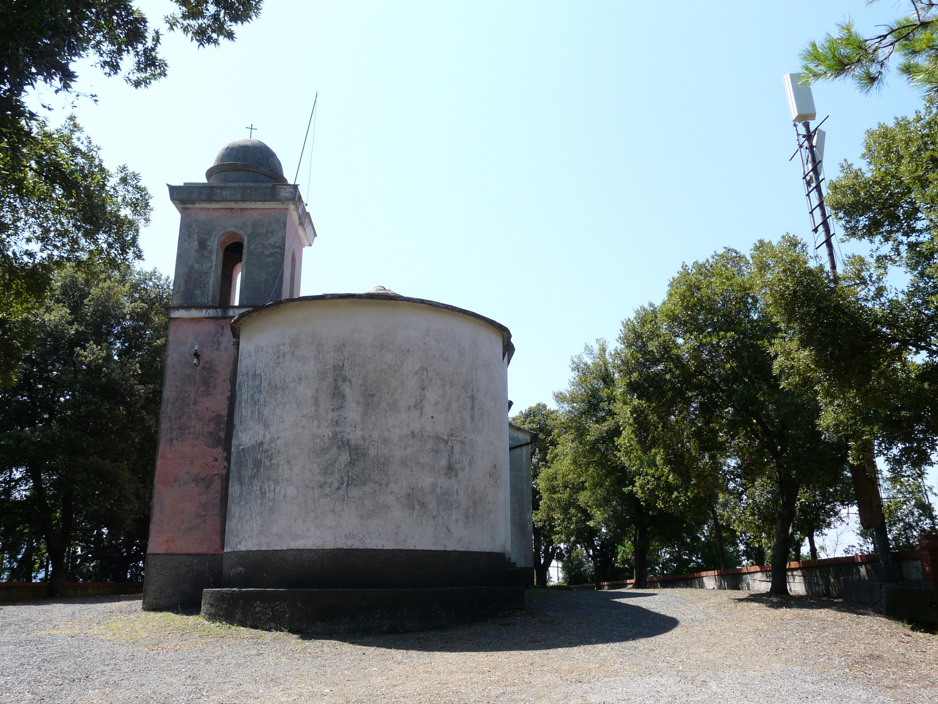 Santuario della Madonna di Loreto nella frazione di Masso, Castiglione Chiavarese, Liguria, Italia